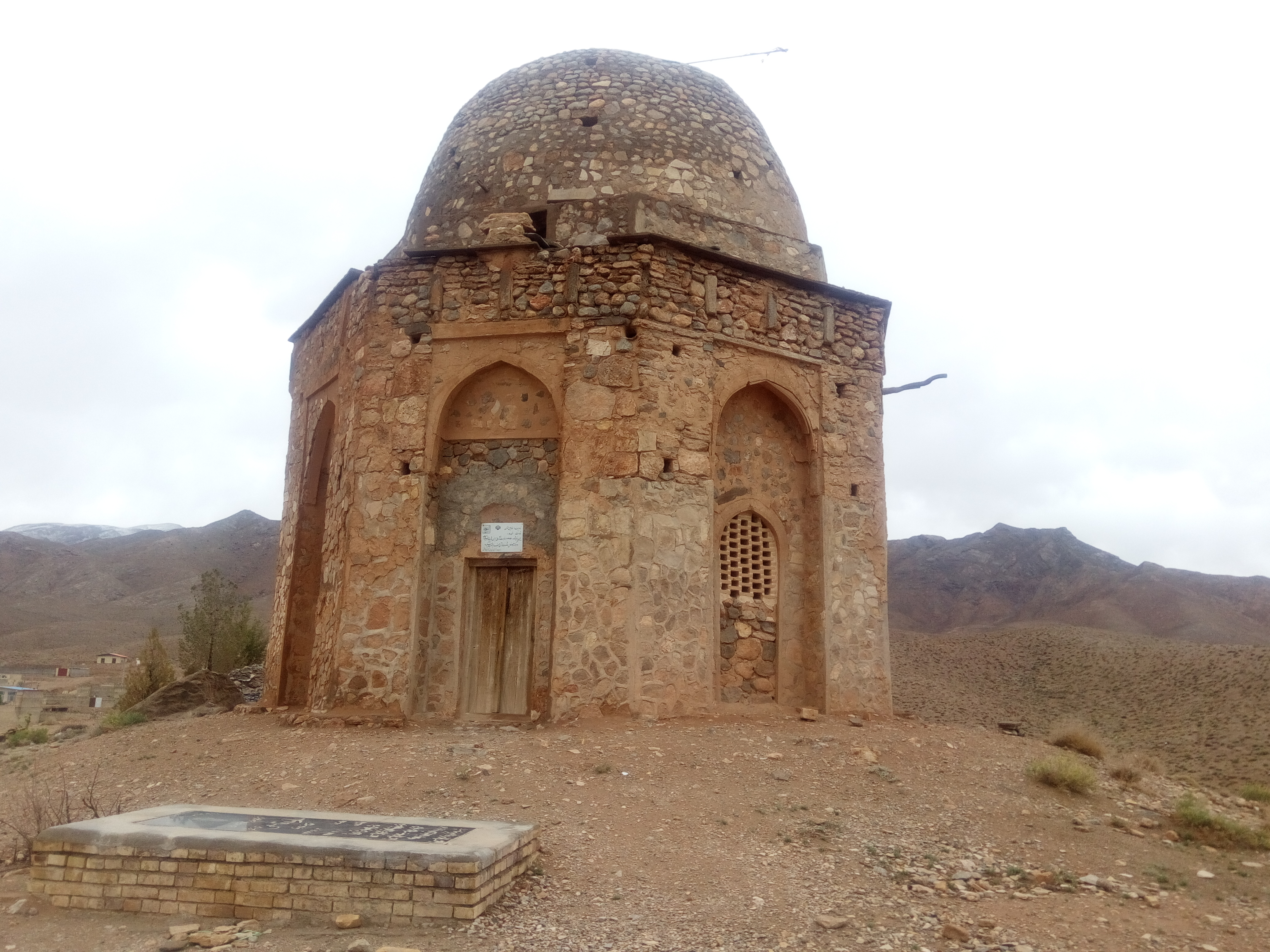 آرامگاه چهل دختران